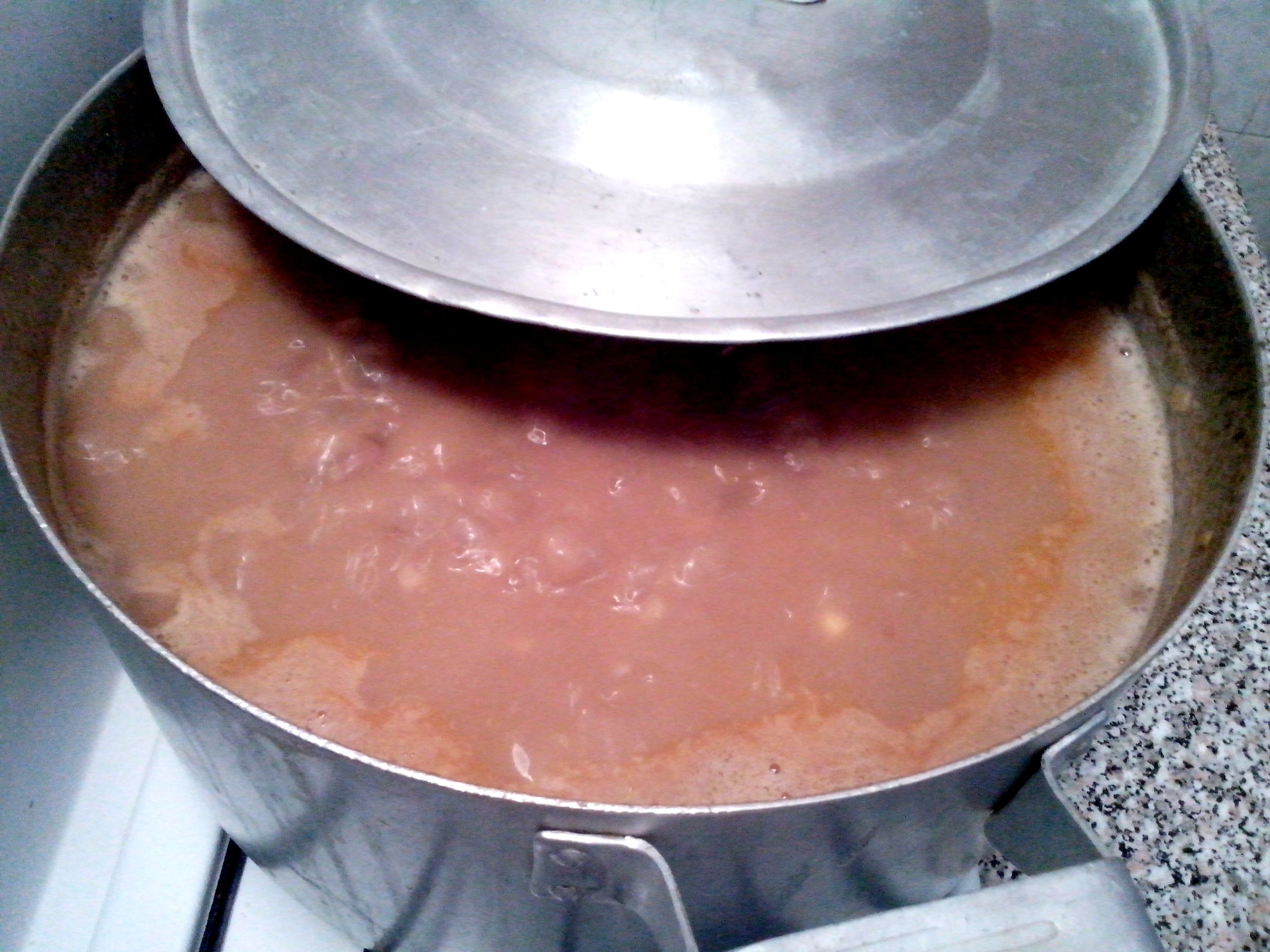 Hədik